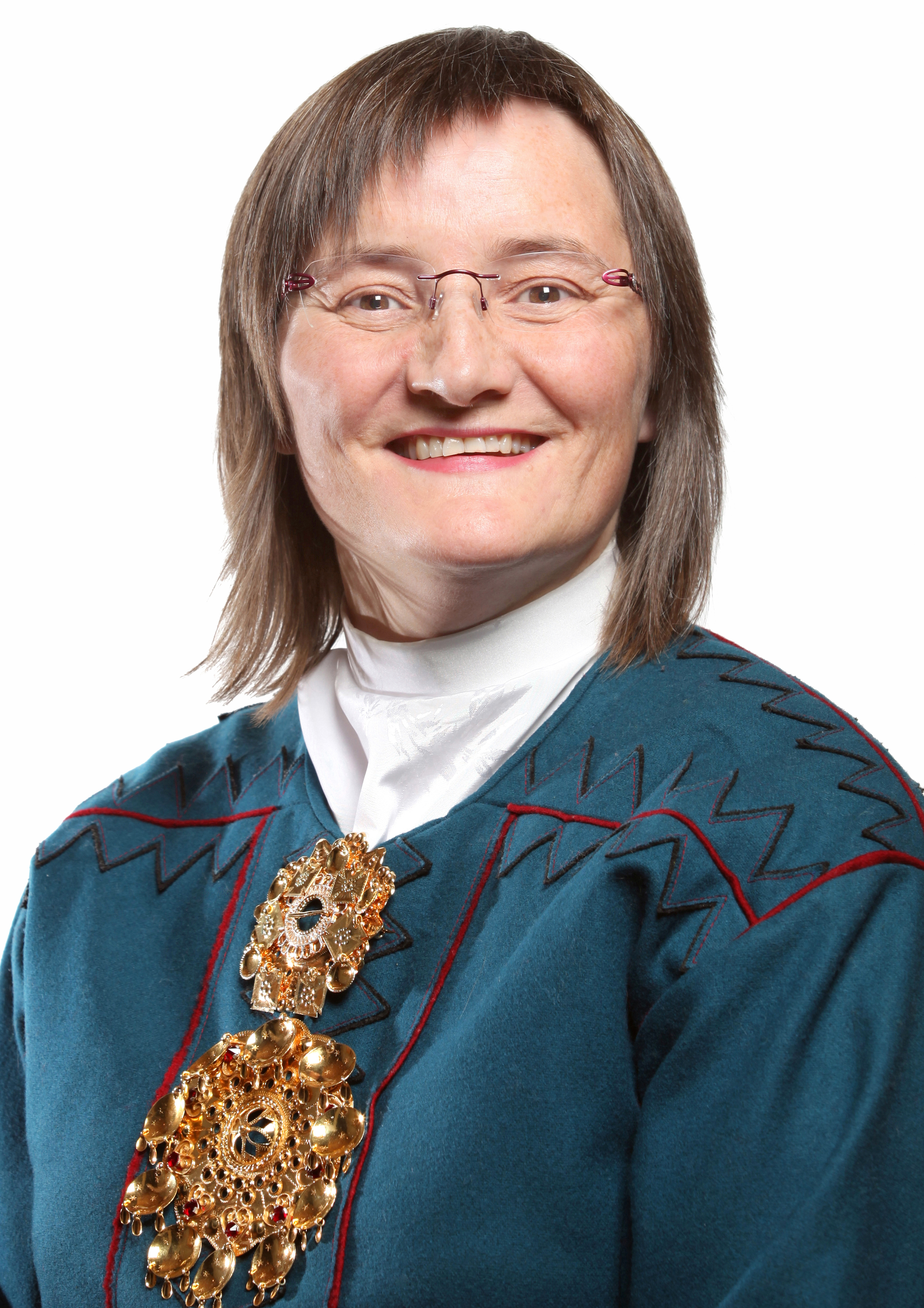 Leder av partiet Nordkalottfolket. Medlem av plan- og finanskomitéen. Foto: Kenneth Hætta / Sametinget.